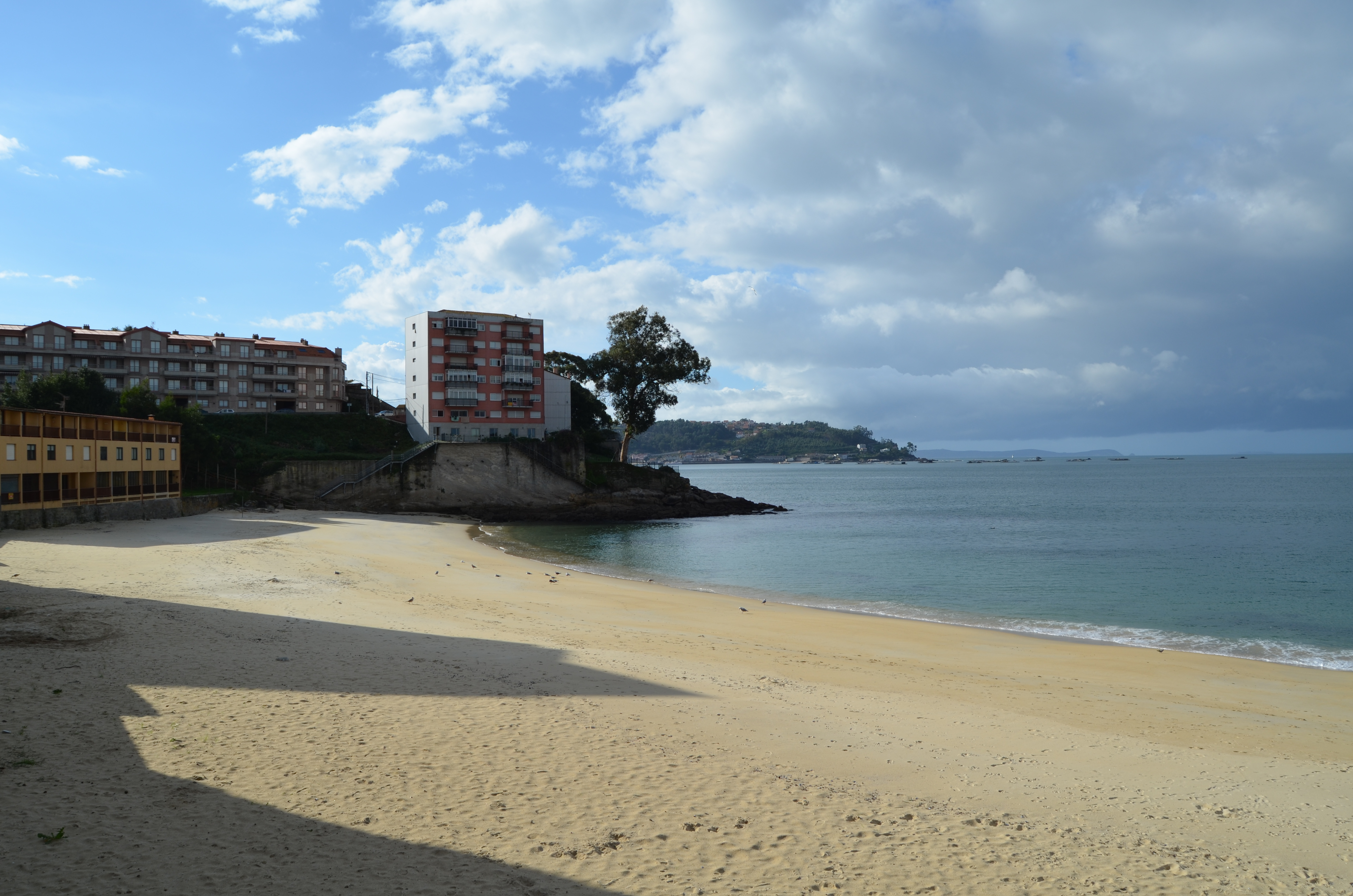 Foto de la playa de Loureiro (Bueu) Situada en la provincia de Pontevedra. Con vistas a Sansenxo y a la Illa de Ons.